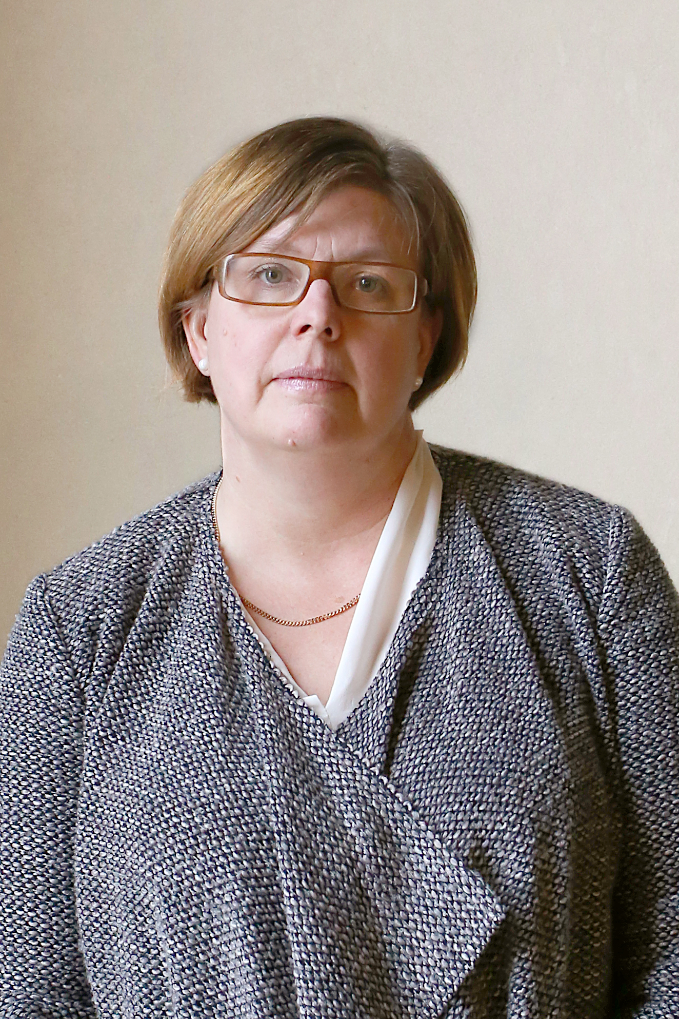 Cecilia Brinck (M), oppositionsborgarråd i Stockholms stad